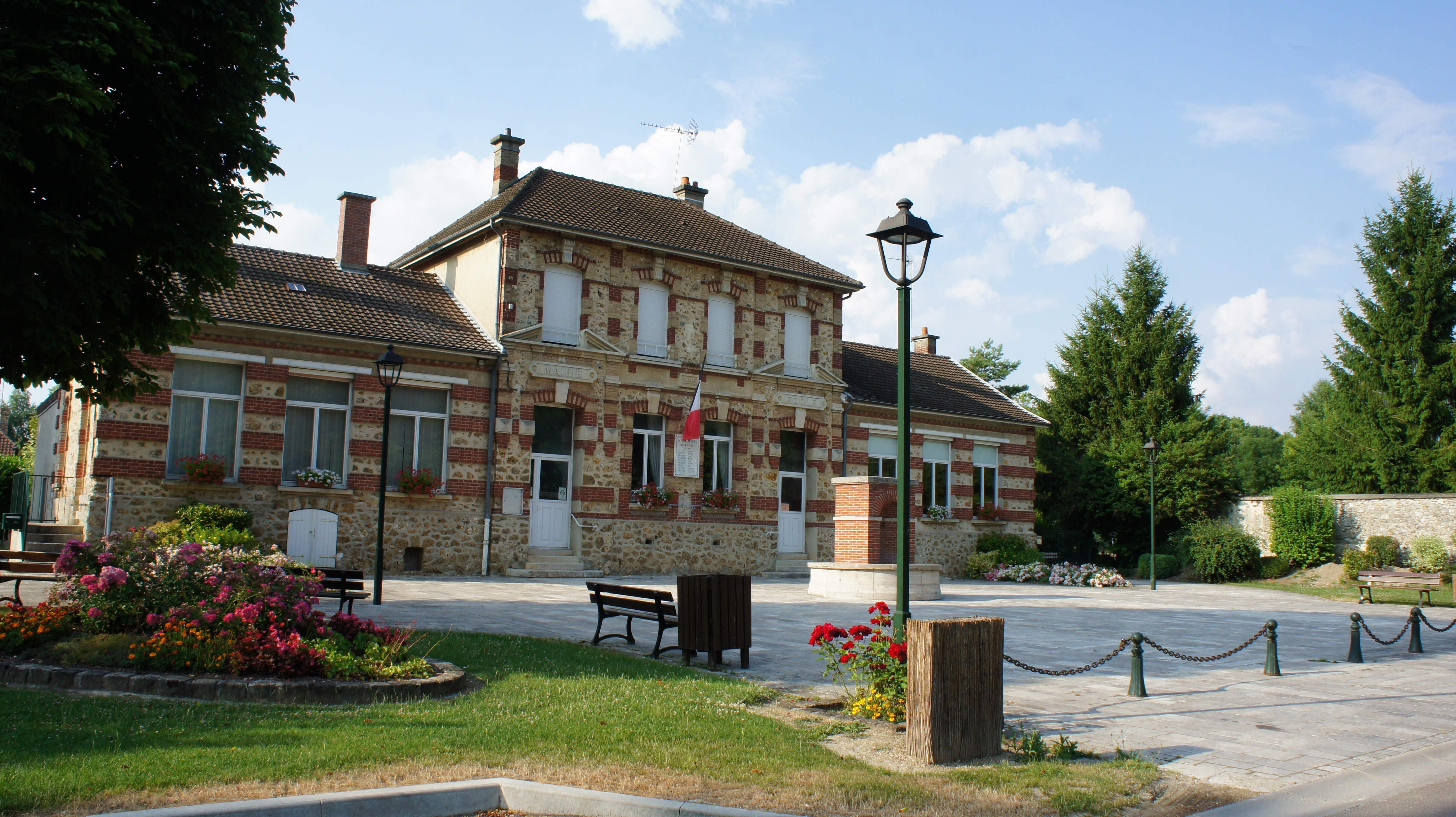 Une vue de .